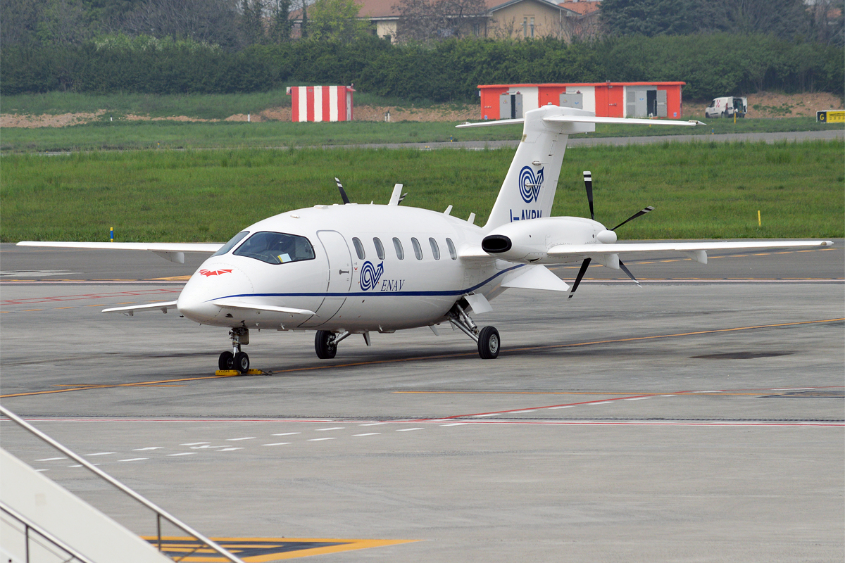 ENAV, I-AVBN, Piaggio P-180